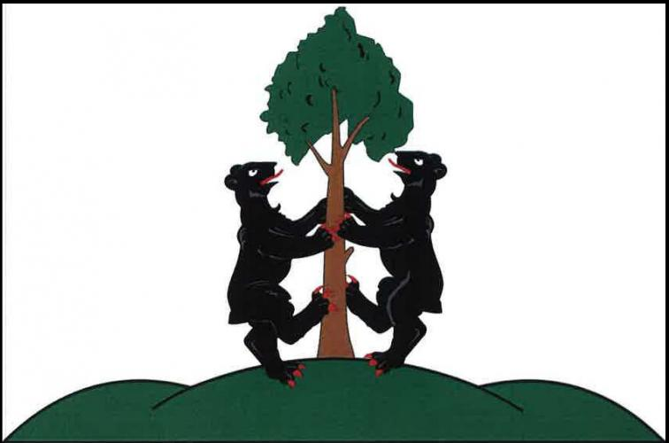 vlajka obce Přimda